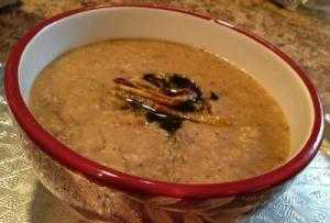 سوپ بلغورشیر